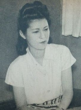 諏訪根自子